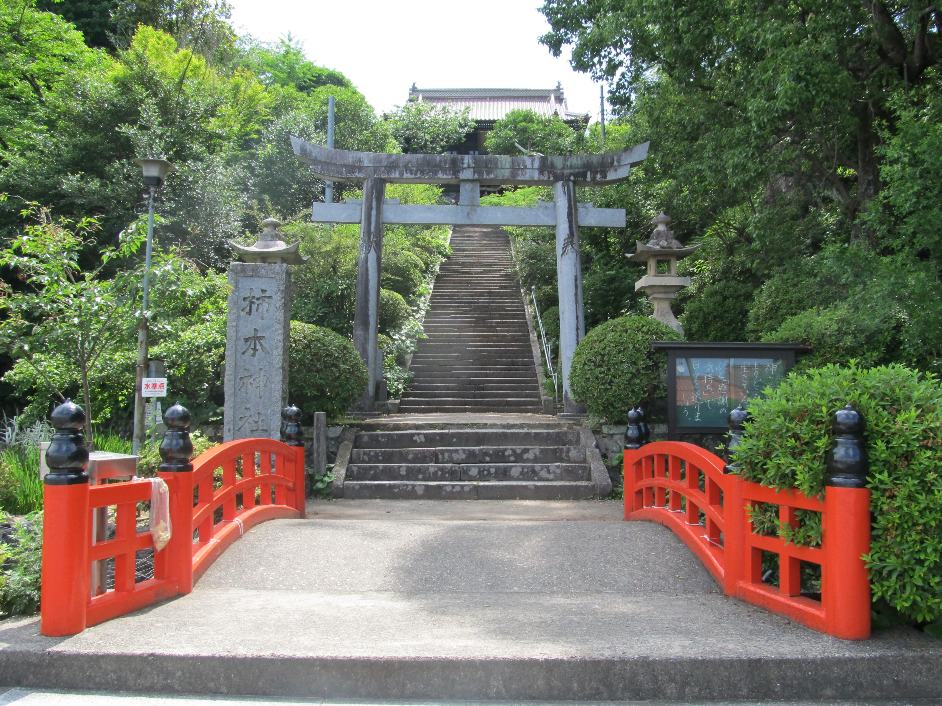 高津柿本神社 鳥居と社名標